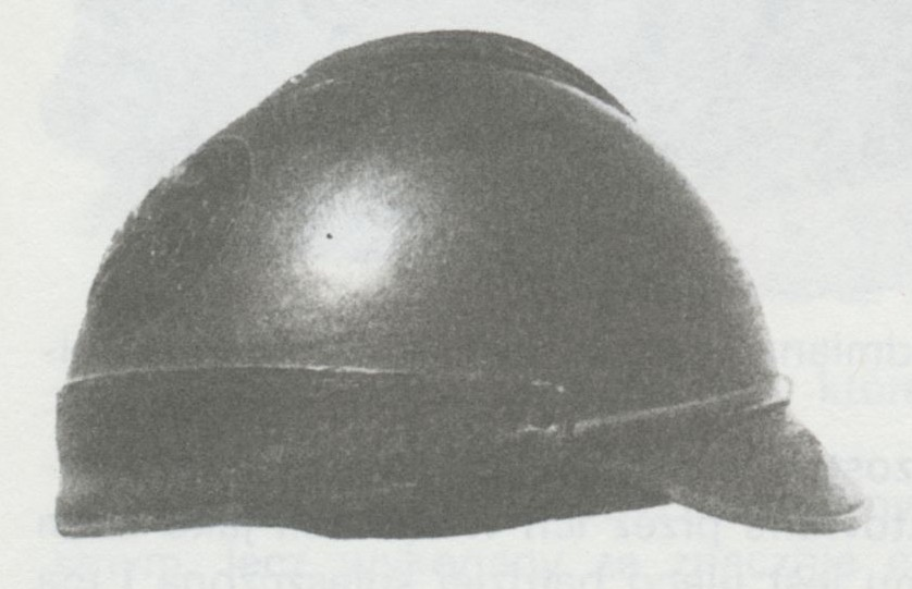 Hełm czołgowy wz. 19